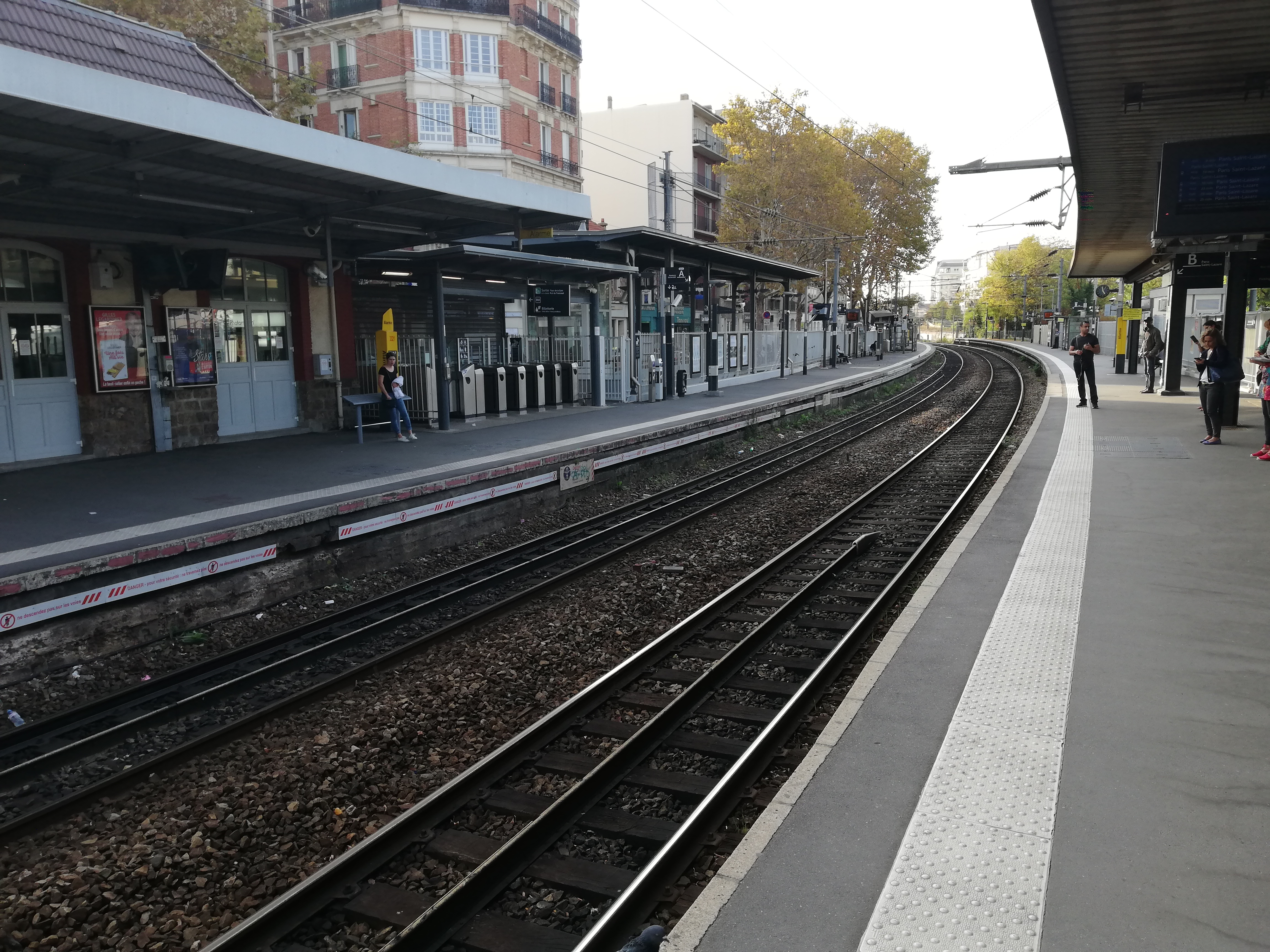 Vue des quais en direction de Cergy-le-Haut à la gare des Vallées, en 2018.